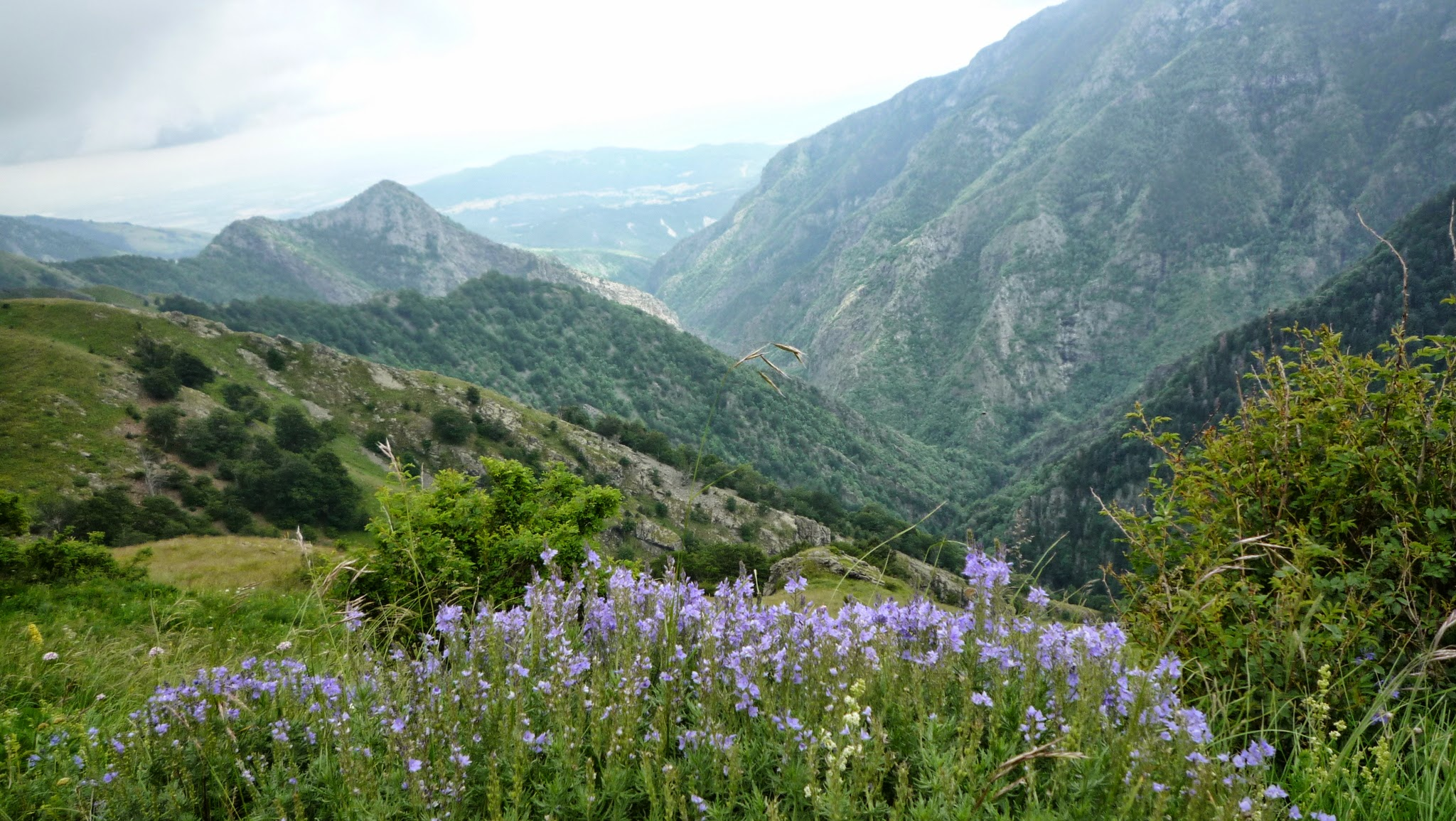 долината на Бяла река/Южен Джендем/